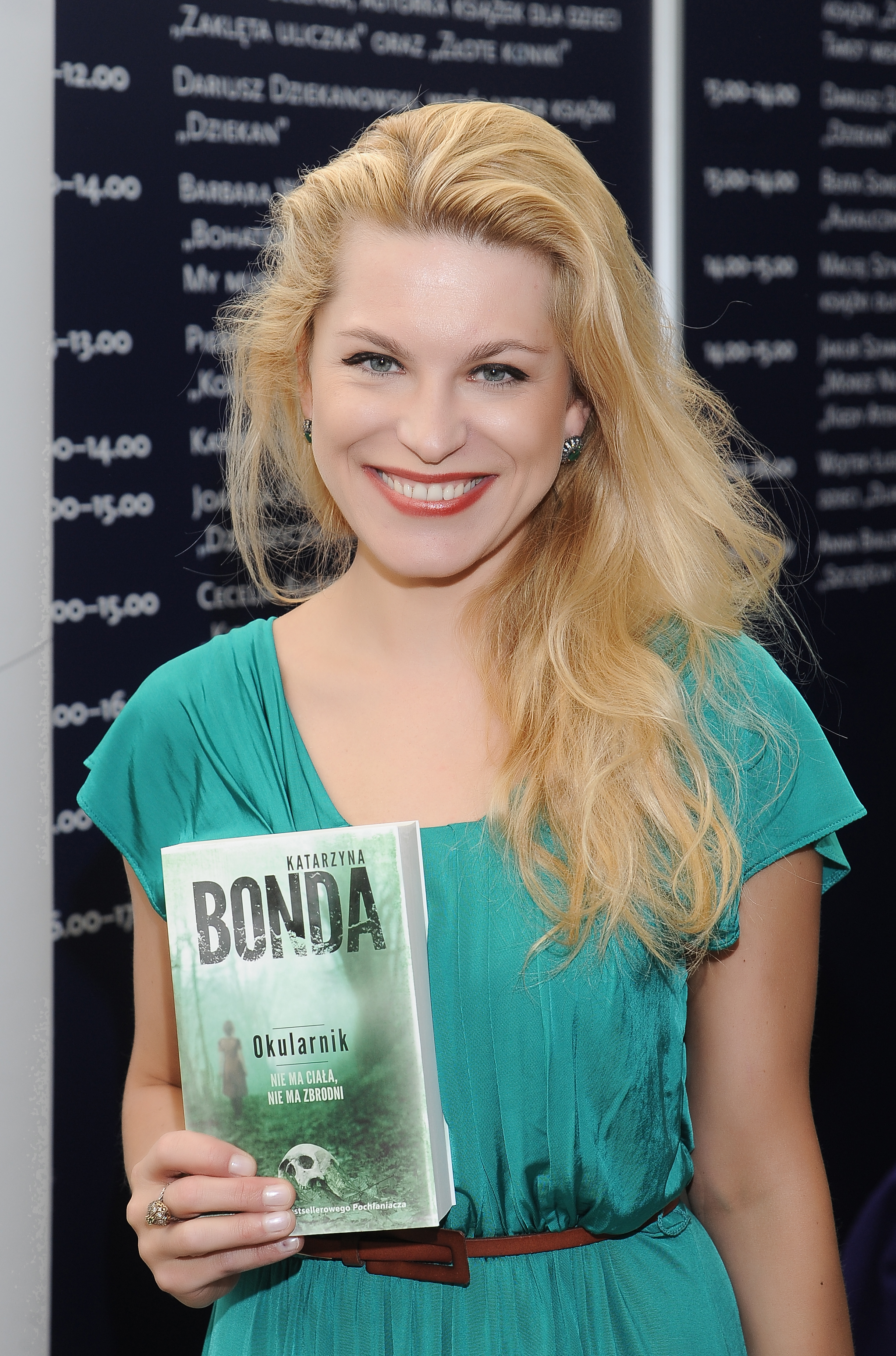 Katarzyna Bonda i "Okularnik" podczas Warszawskich Targów Książki.